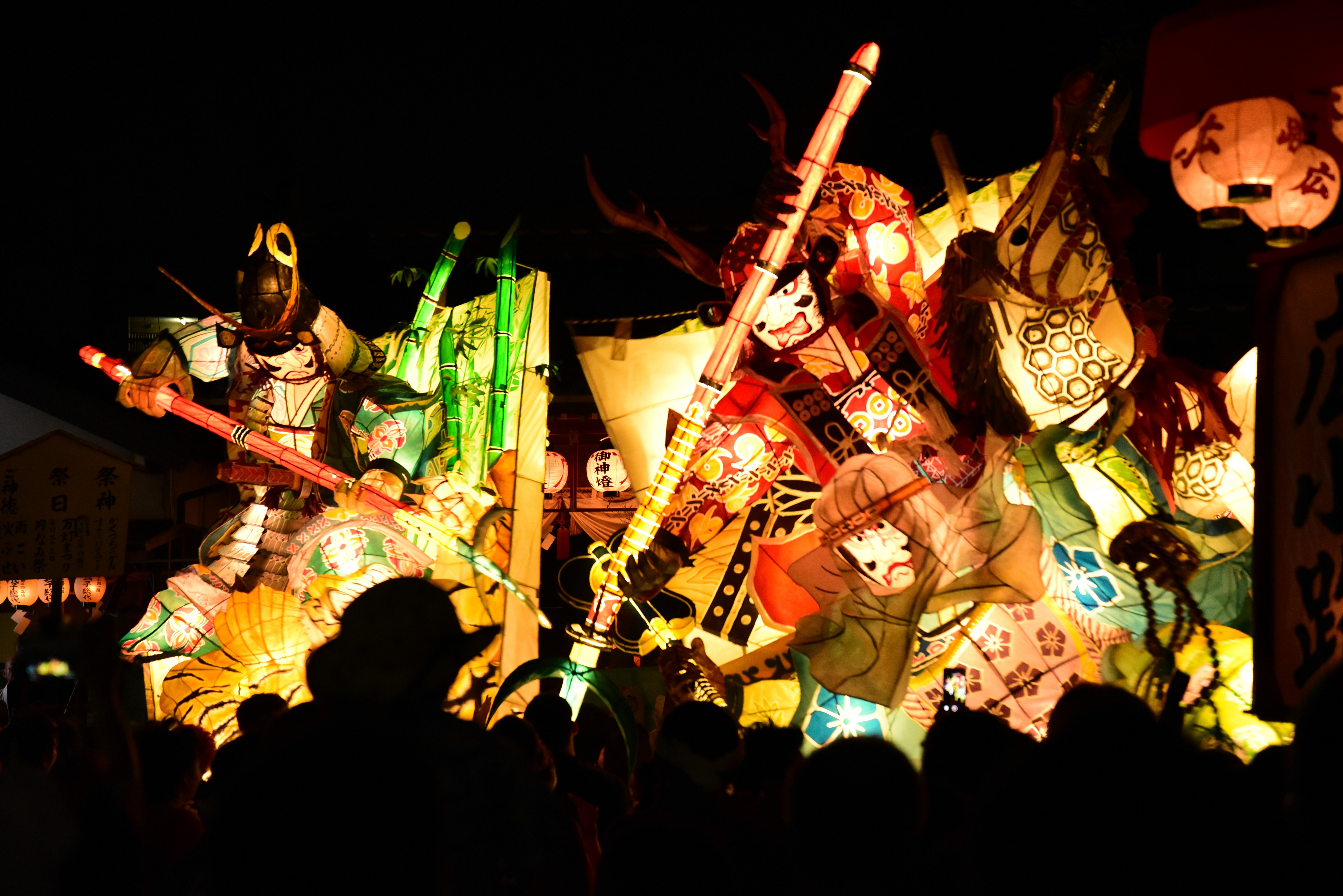 刈谷万燈祭